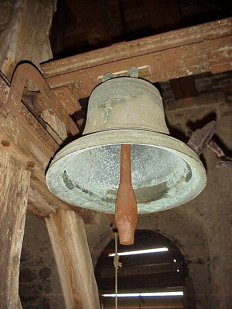 bell, Rehlovice, Czech Republic